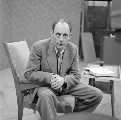 Han Bentz van den Berg